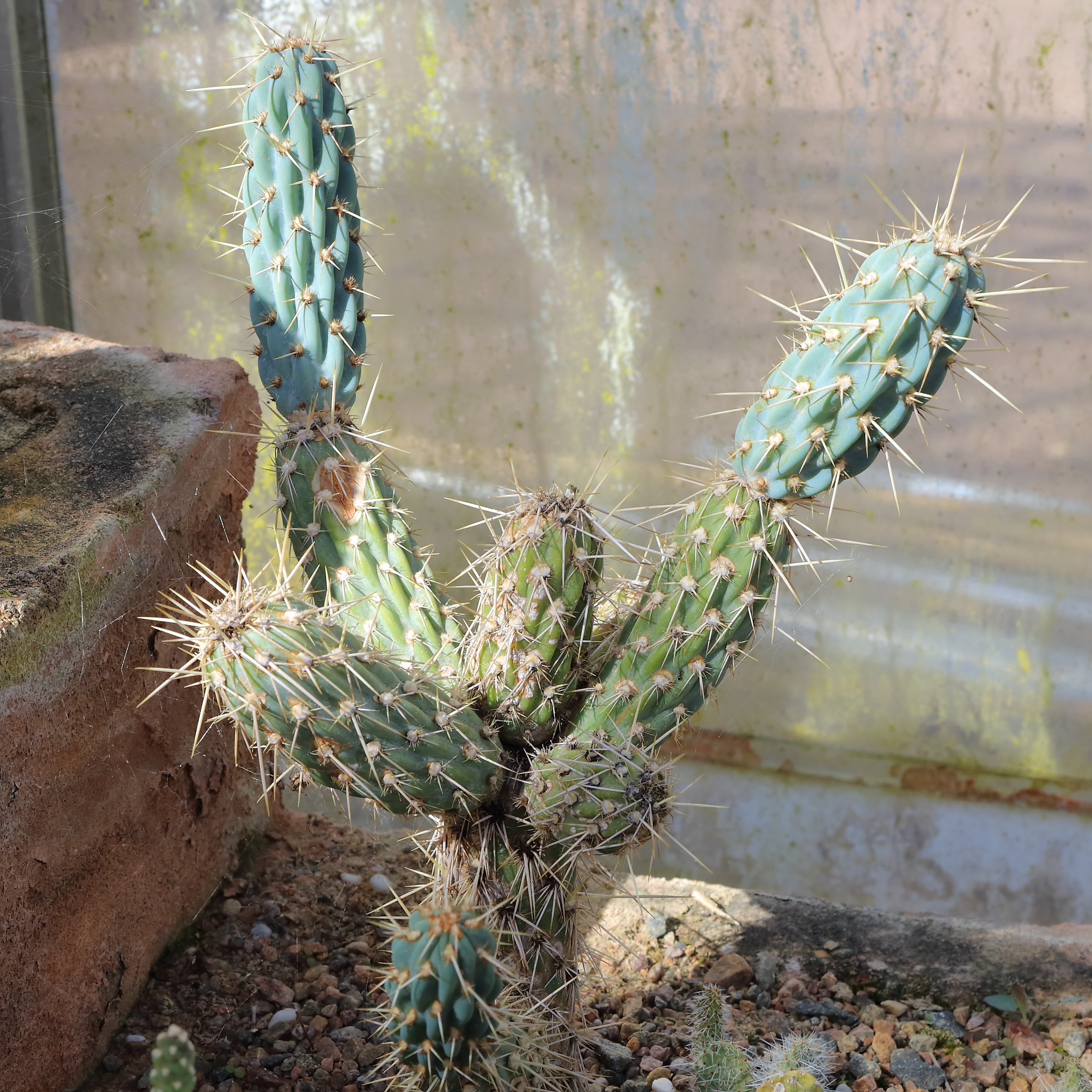 Miqueliopuntia miquelii identifierad med hjälp av skylt i Göteborgs botaniska trädgård.